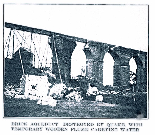 Acueducto de Pinula después del terremoto de 1917-18.